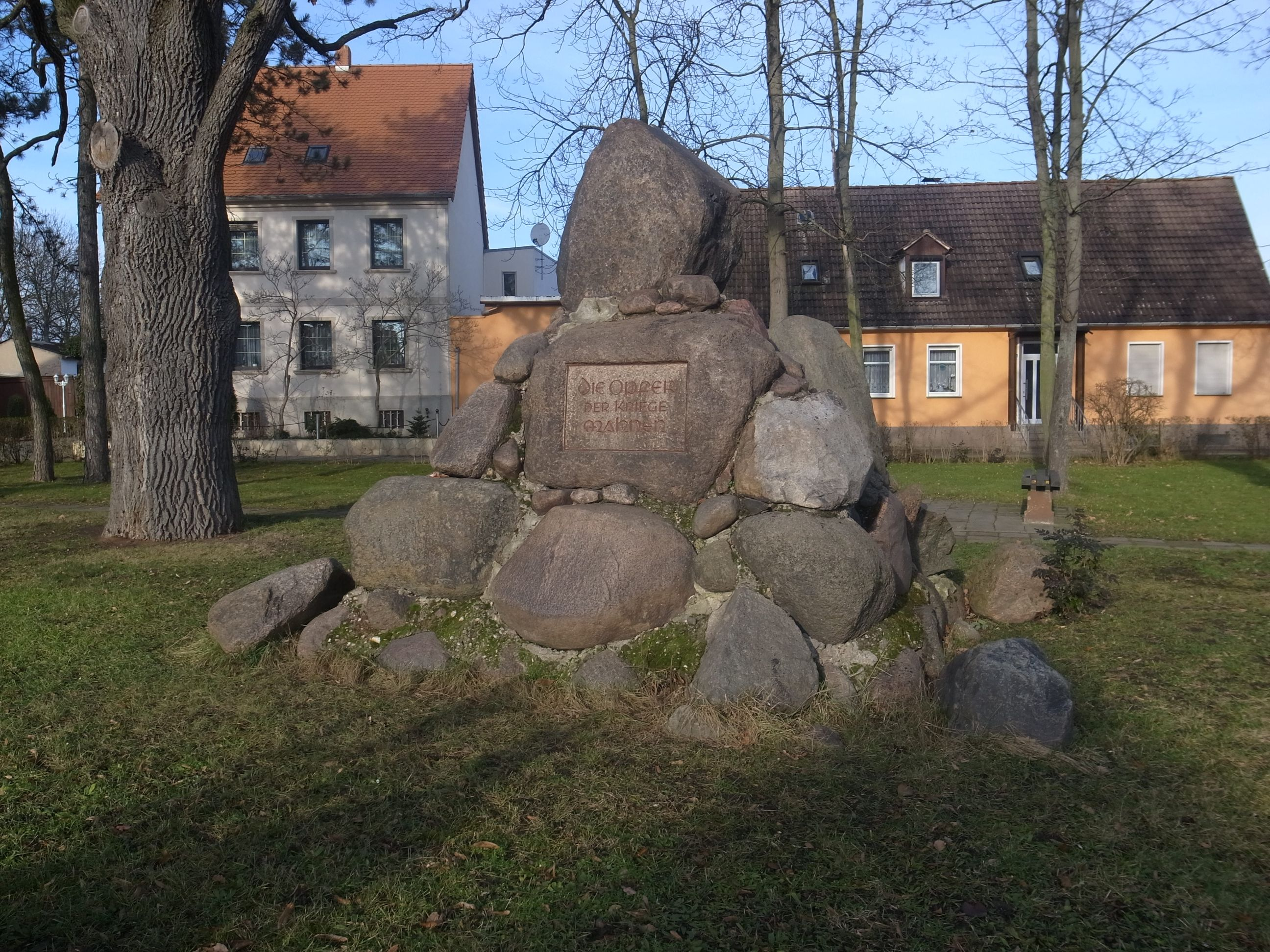 Groß Rosenburg, Denkmal Die Opfer der Kriege Mahnen